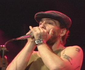 Patrick Esposito au Festival Franco-Ontarien.